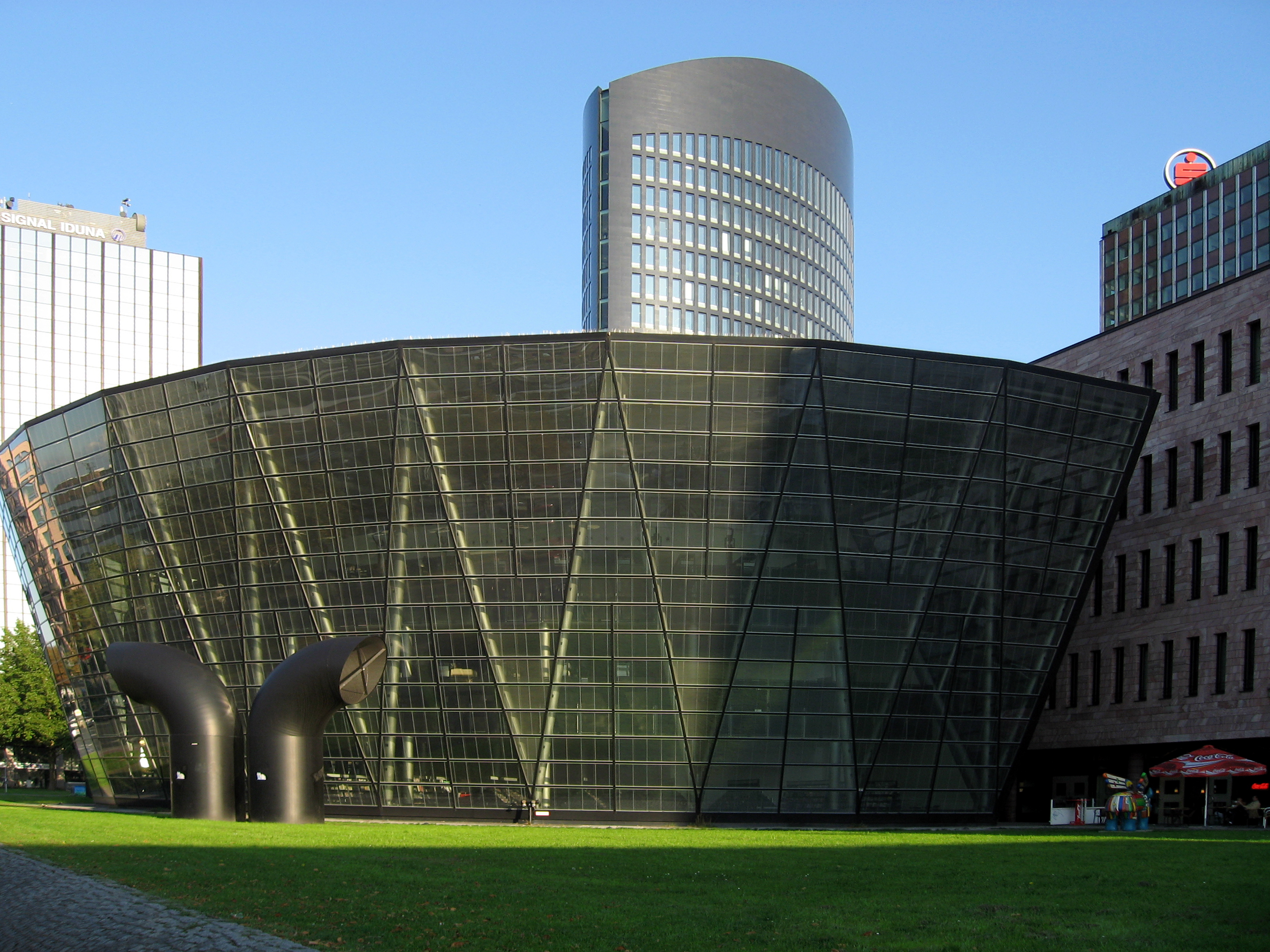 Dortmund, Stadt- und Landesbibliothek, Westseite